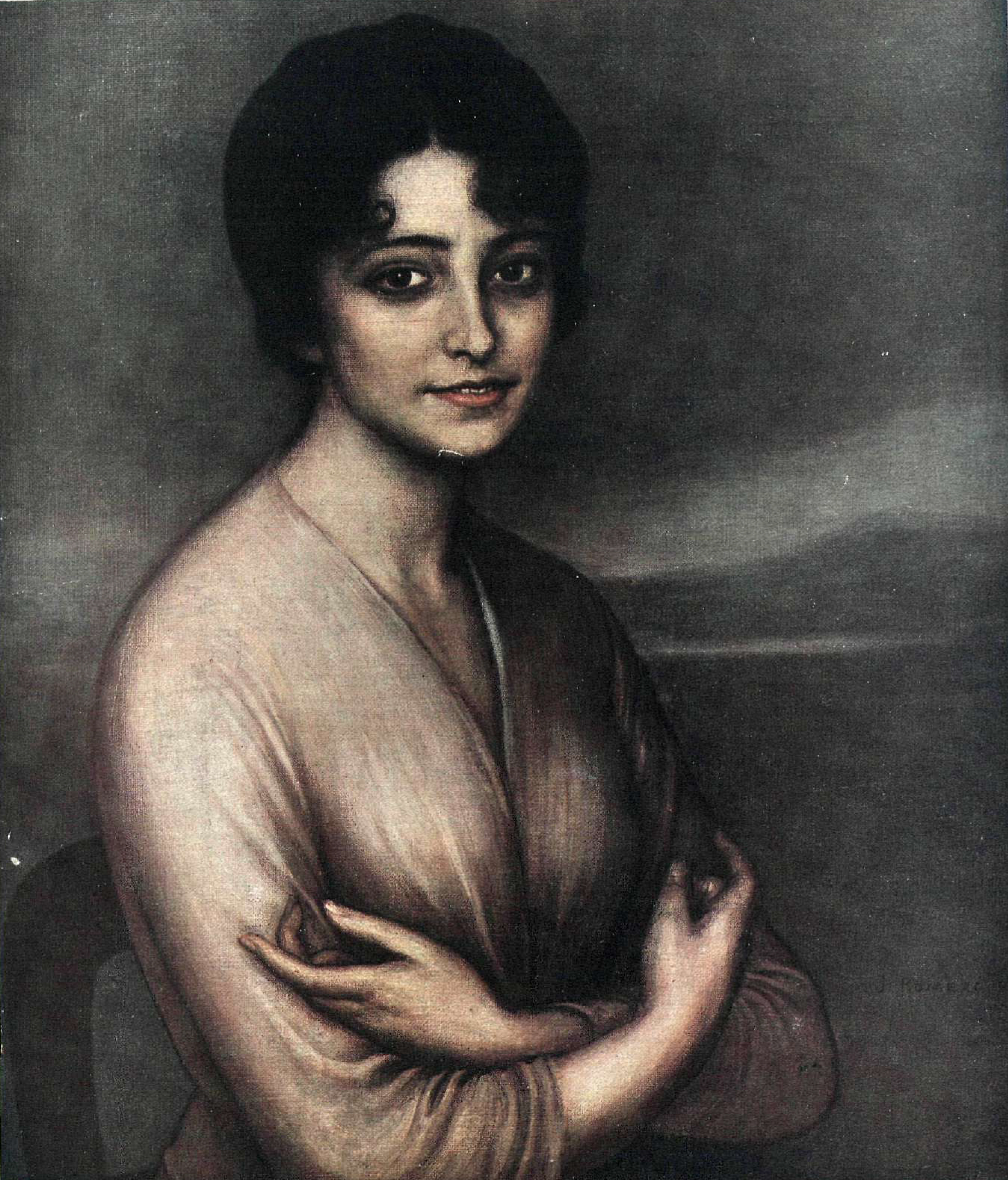 Retrato de la señorita Julia Pachelo.